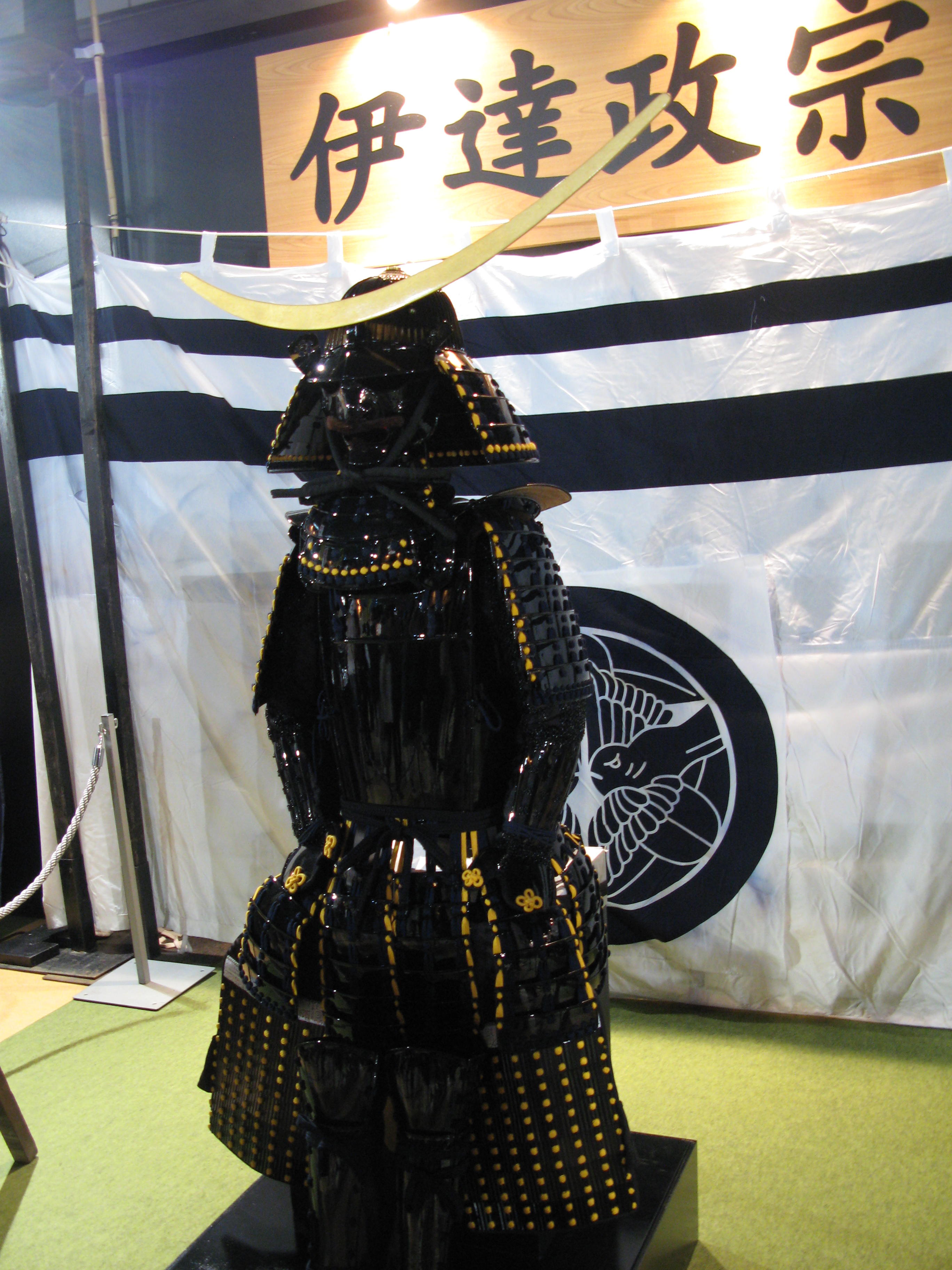 Masamune Date's armour